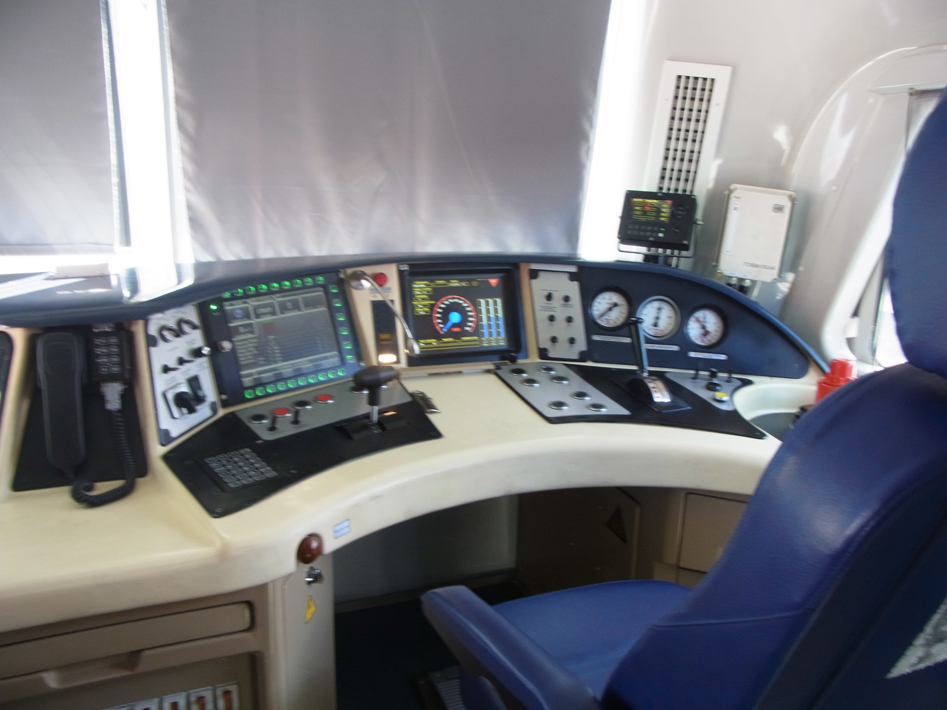 Пульт управления машиниста в кабине тепловоза 3ТЭ25К2М-0001